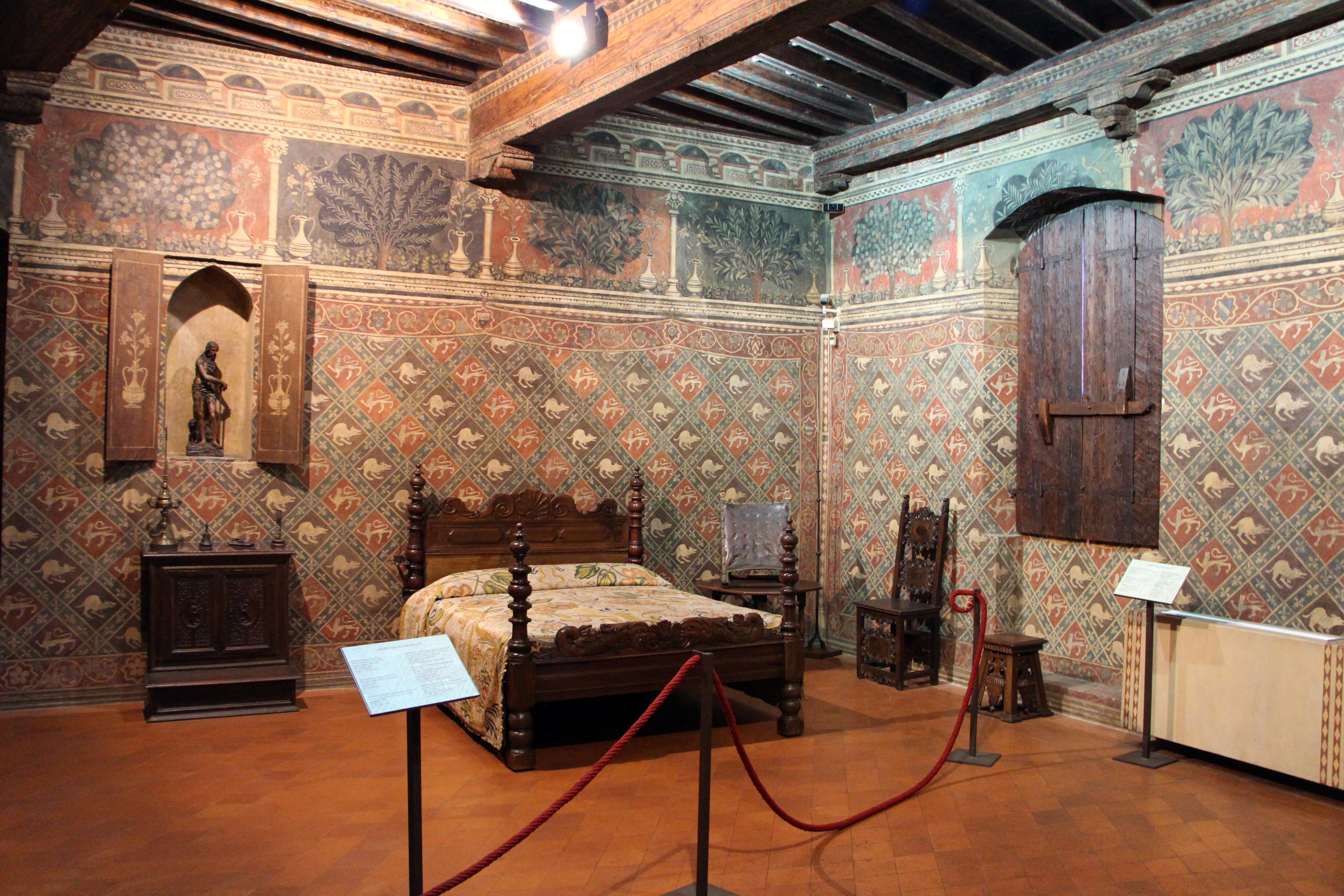 Museo della Casa fiorentina Antica - Palazzo Davanzati - MIBAC The making of this document was supported by Wikimedia CH. (Submit your project!) For all the files concerned, please see the category Supported by Wikimedia CH. This is a photo of a monument which is part of cultural heritage of Italy.